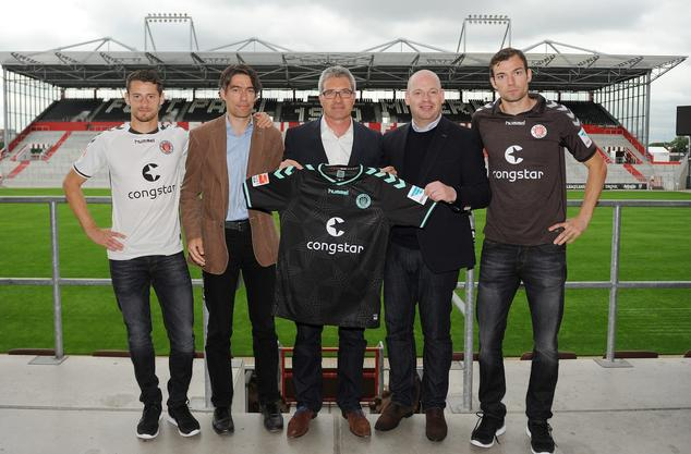 Sportliches Engargement - congstar ist Hauptsponsort des 1. FC St. Pauli.